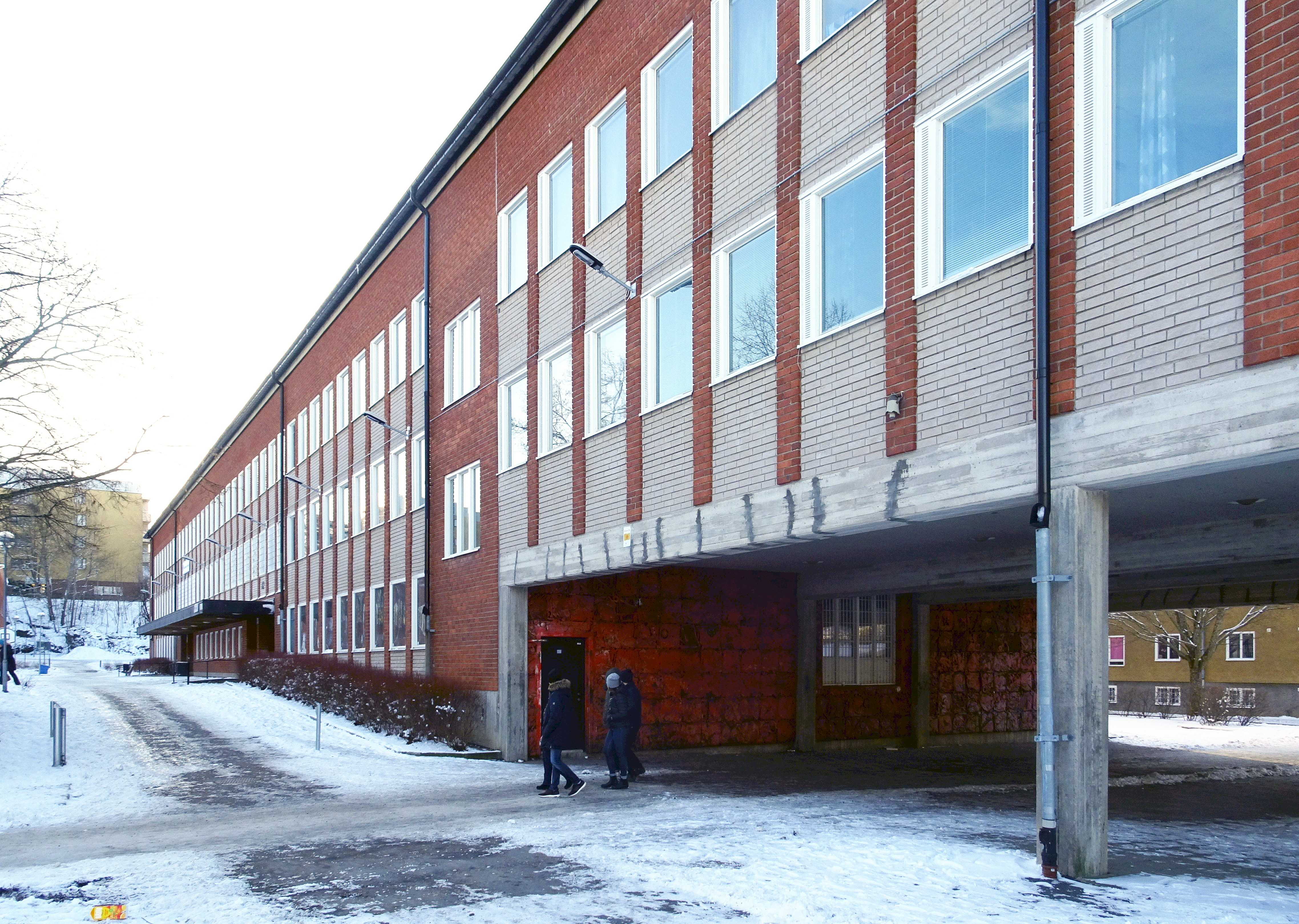 Alla Nationers Fria Skola (före detta Vårbergsskolan) arkitekt Lennart Brundin 1967